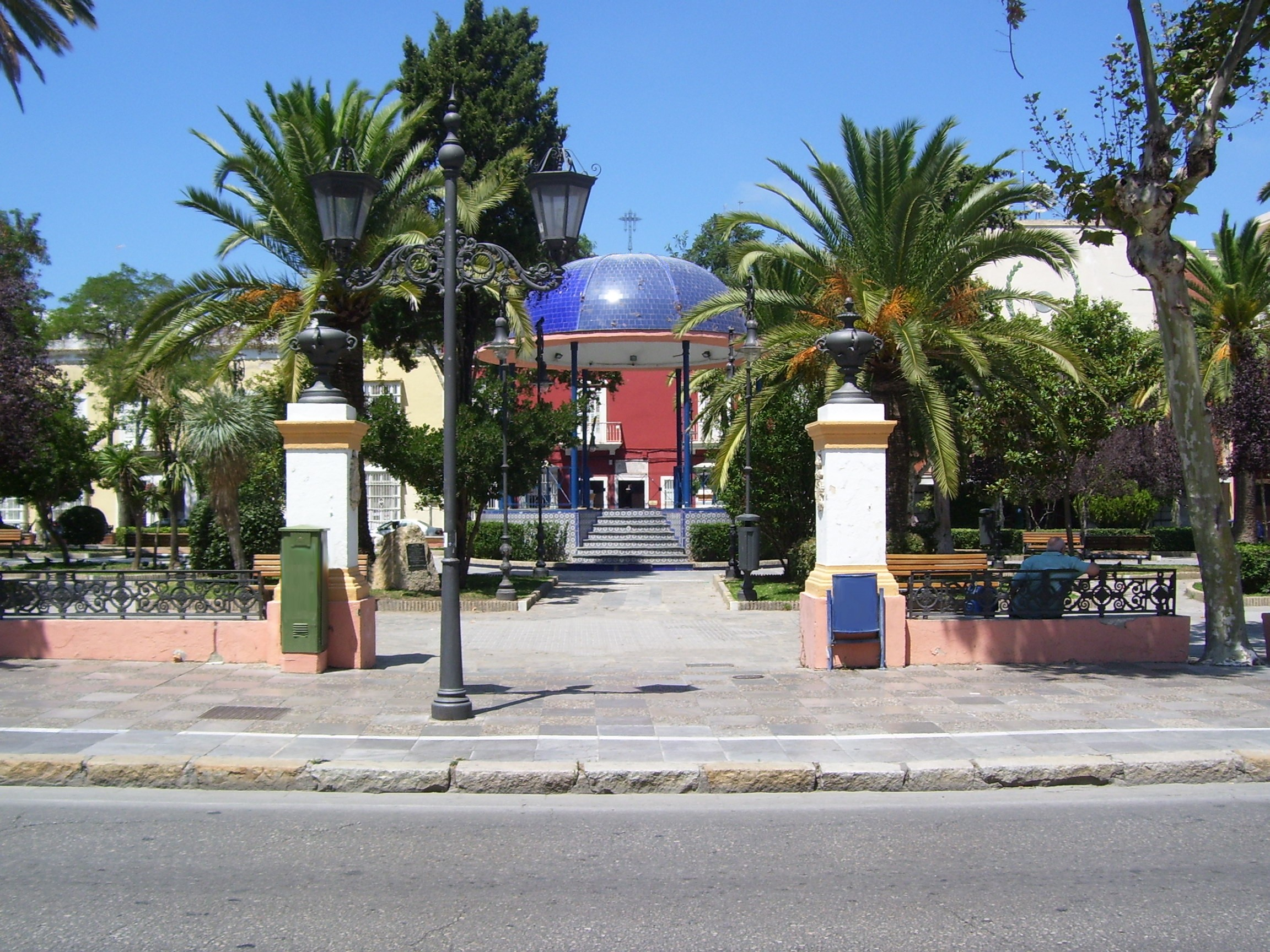 Foto de la alameda "Moreno de Guerra" (o, simplemente, "la Alameda"), en la calle Real de la ciudad de San Fernando (Cádiz, España).